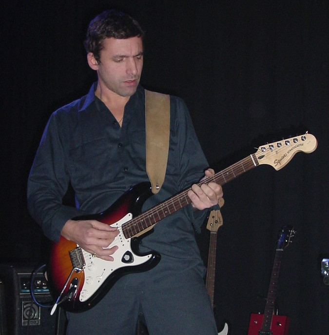 Rocko Schamoni mit seiner Band "Little Machine" im Heidelberger Karlstorbahnhof